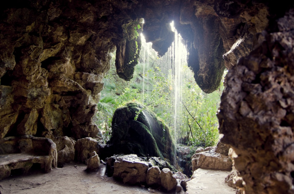 Parc del Llac, al Masnou (Maresme, Catalunya).